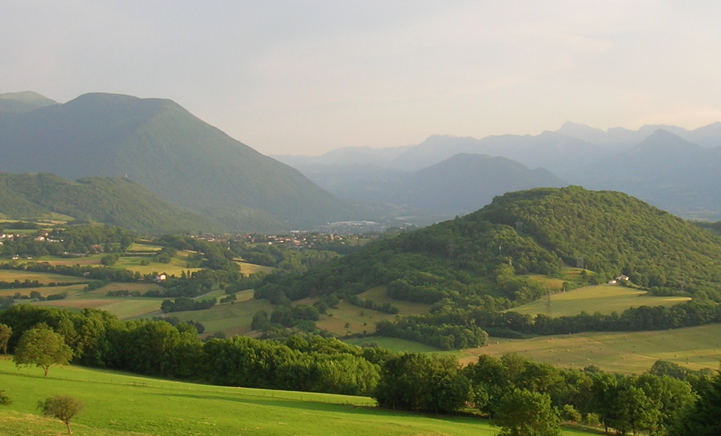 Panorama de Haute-Jarrie vu par le chemin du chatelard (Herbeys).